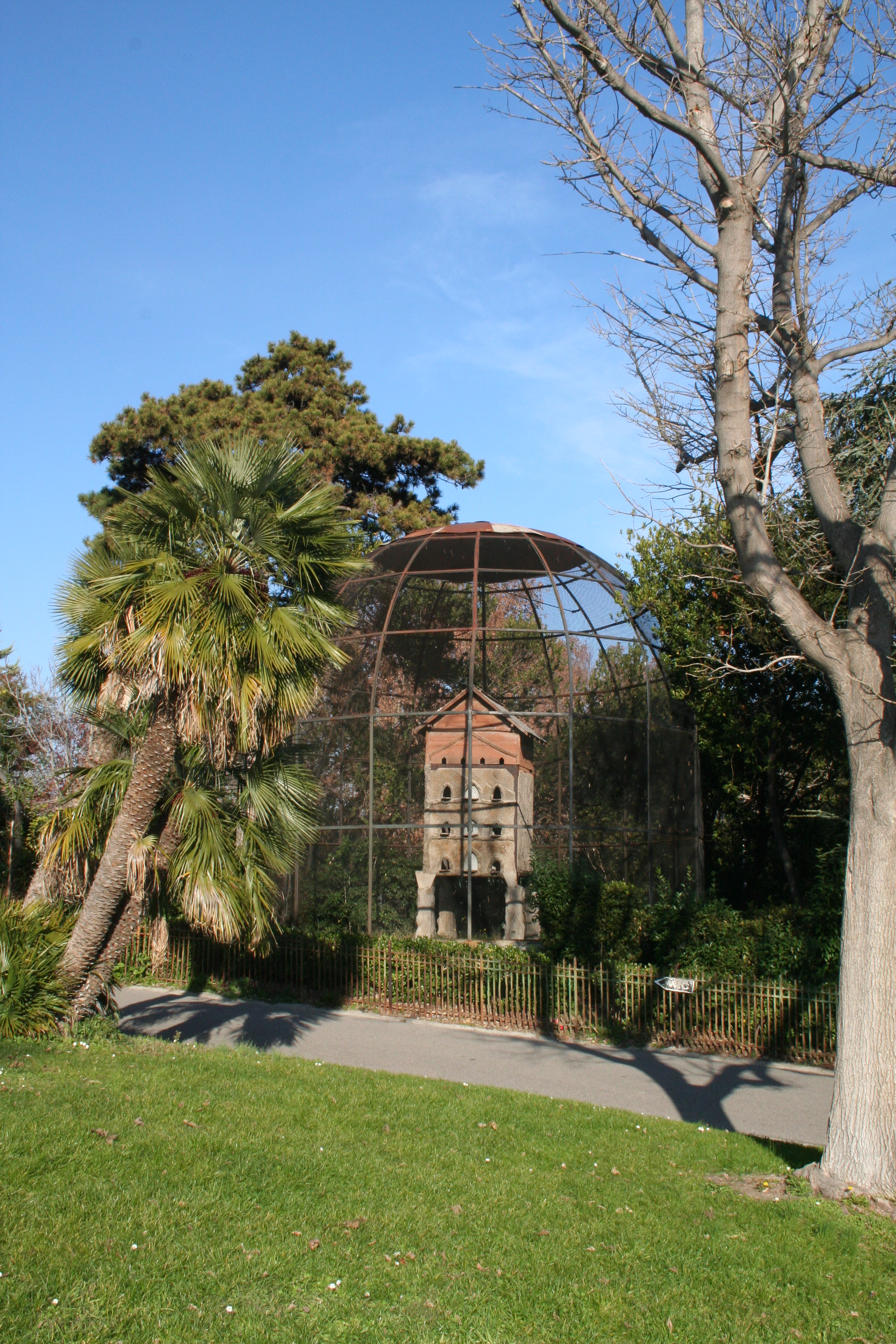 Palais Longchamp, Marseille (France).